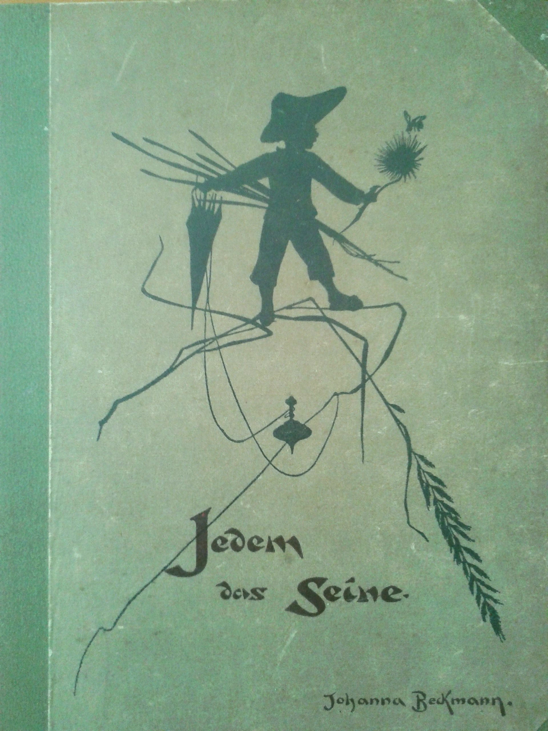 Bucheinband: Johanna Beckmann (1868-1941): Jedem das Seine. Schwarzbilder (Scherenschnitte) und Sprüche. Verlag Martin Warneck, Berlin 1906.